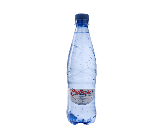 قنينة المياه الغازية الطبيعية أولماس